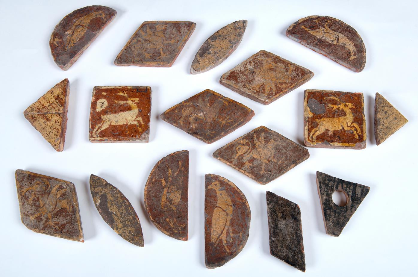 Carreaux de pavement du manoir de Calleville au musée d'Art, Histoire et Archéologie d'Evreux